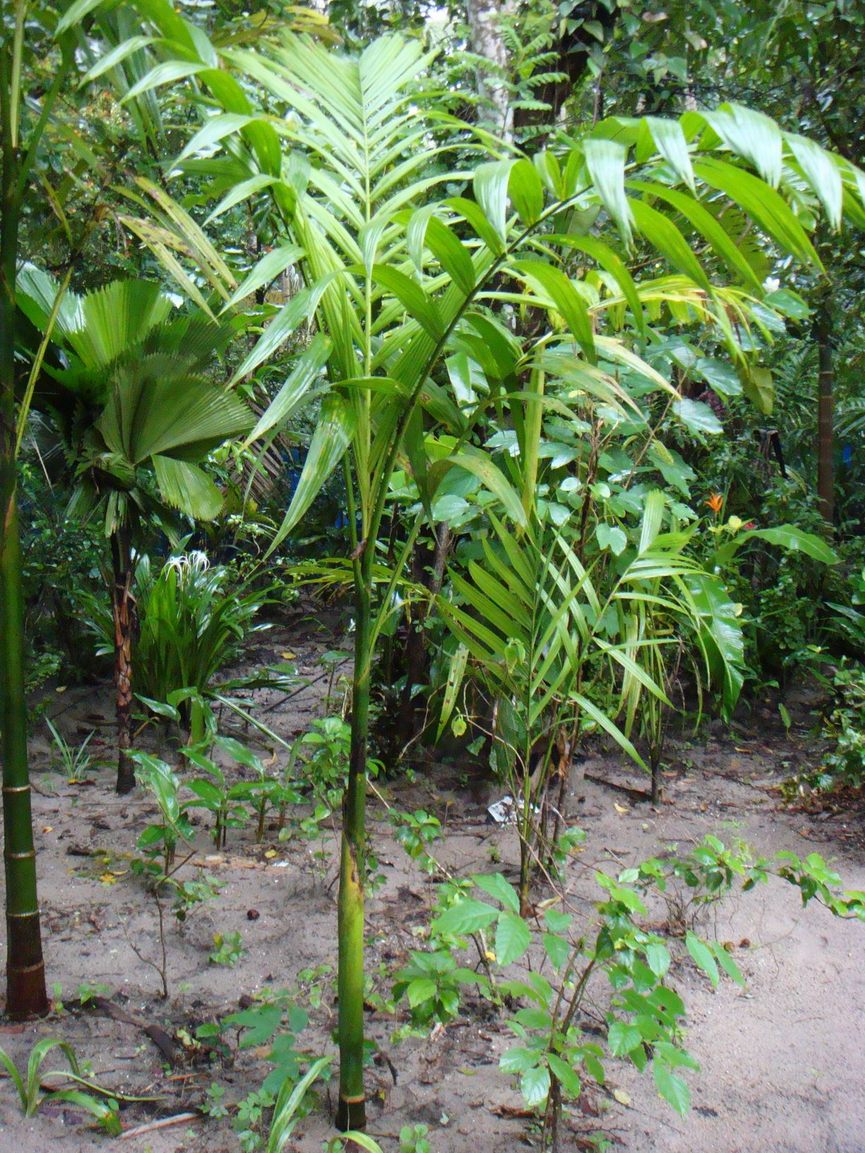 കവുങ്ങ്, ചെറിയ ചെടിയും ഇടത്തരം വളർച്ചയെത്തിയതും